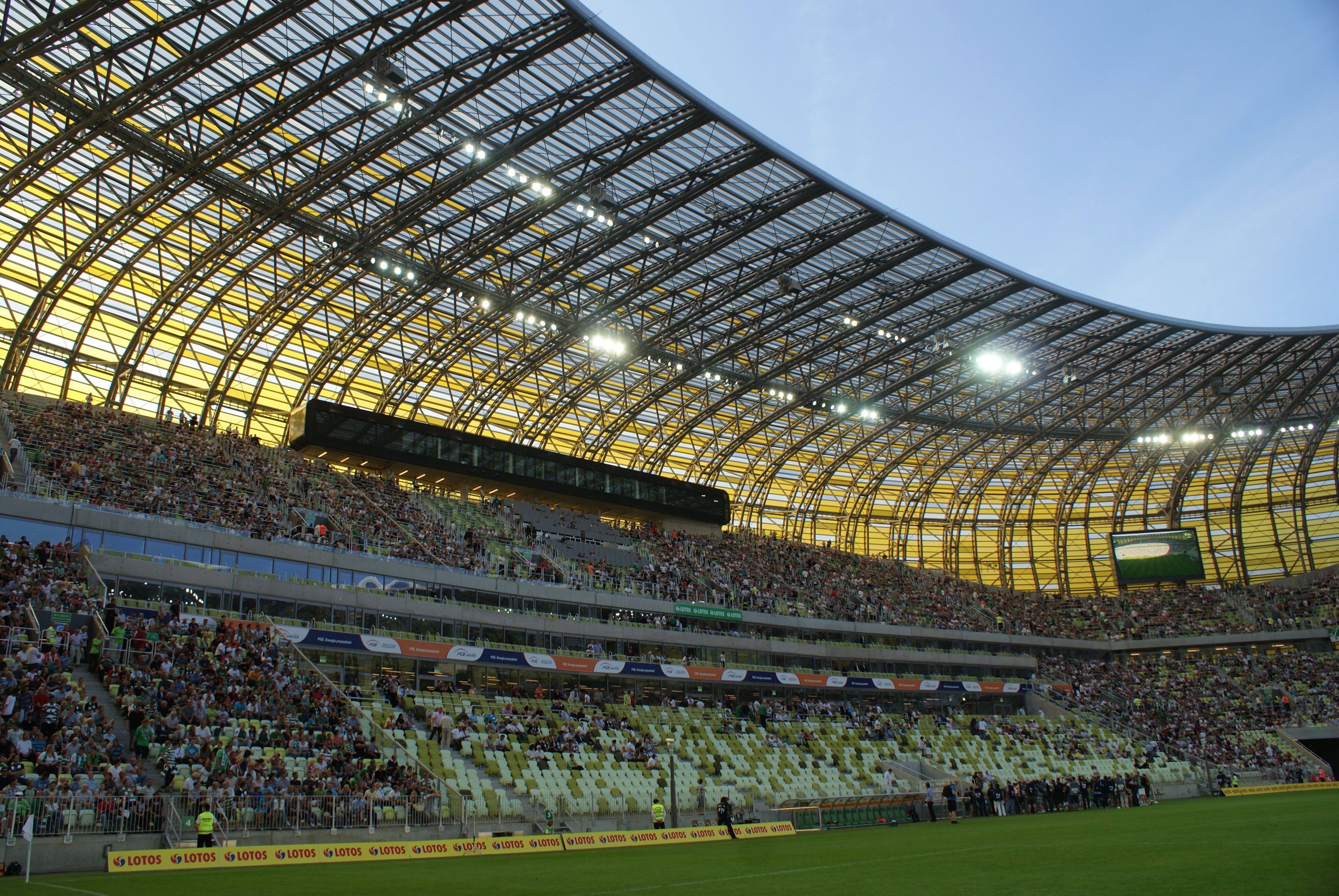 PGE Arena